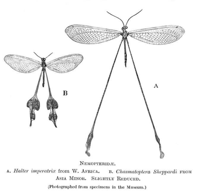 Nemopteridae